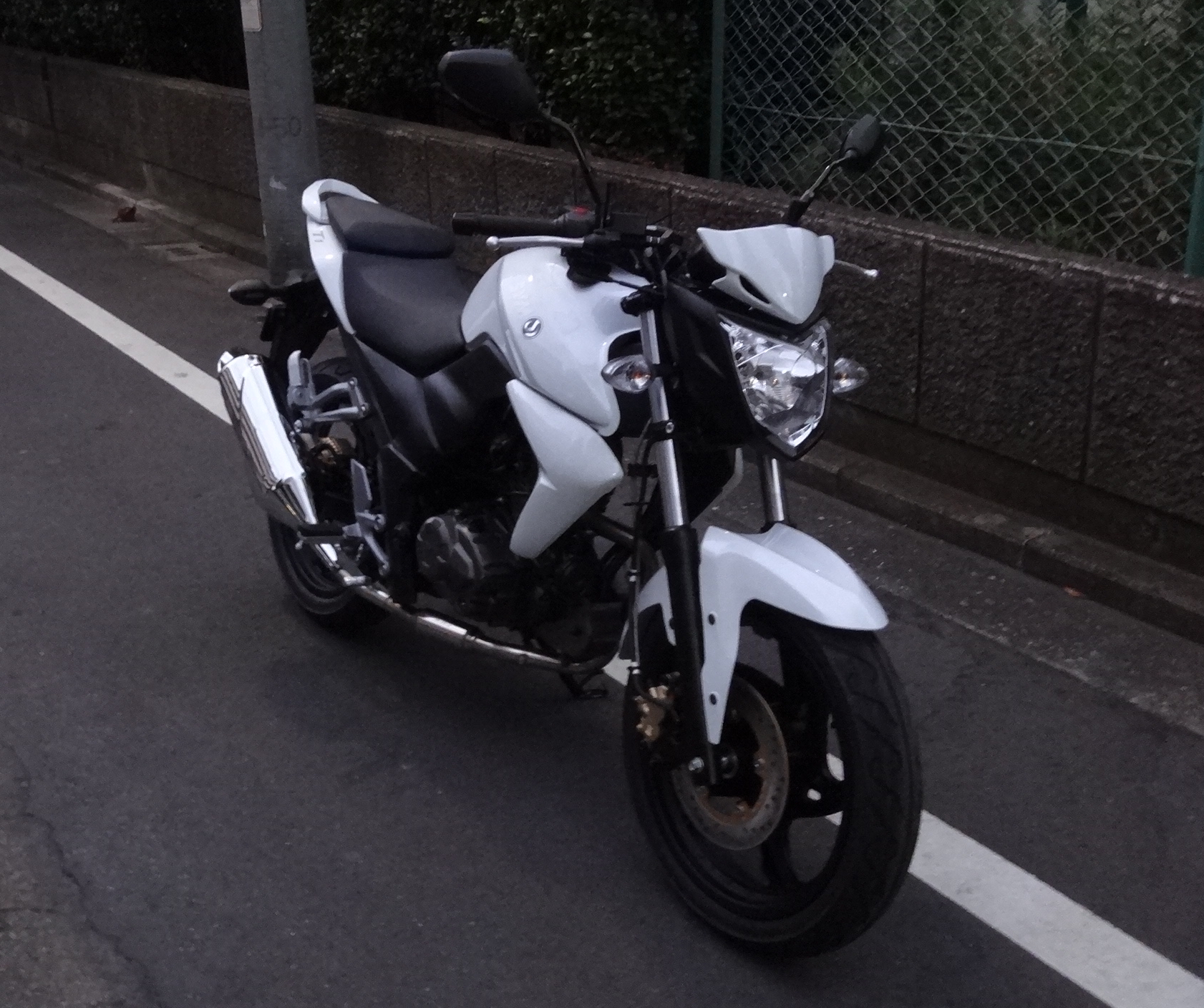 SYMのT1 125ccのオートバイ